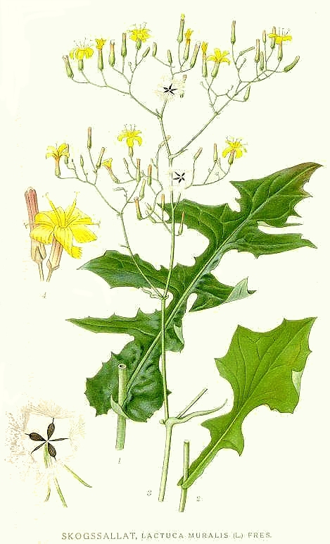 Mycelis muralis (L.) Dumort., syn. Cicerbita muralis (L.) Wallr., Lactuca muralis (L.) Gaertn. Original Description Skogssallat, Lactuca muralis (L.) Fres.